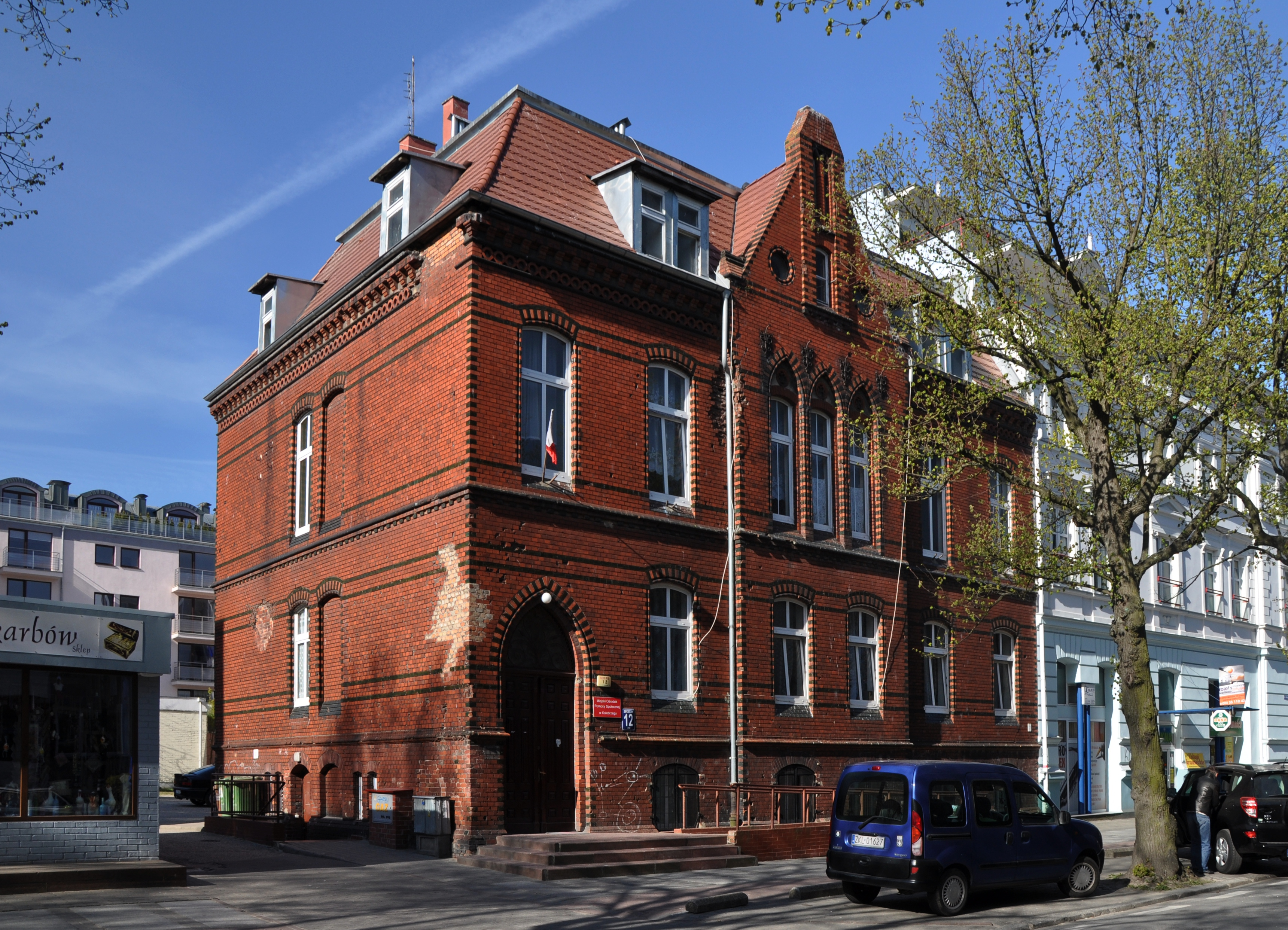 Kołobrzeg ul. Zwycięzców 12 - Miejski Ośrodek Pomocy Społecznej (MOPS)